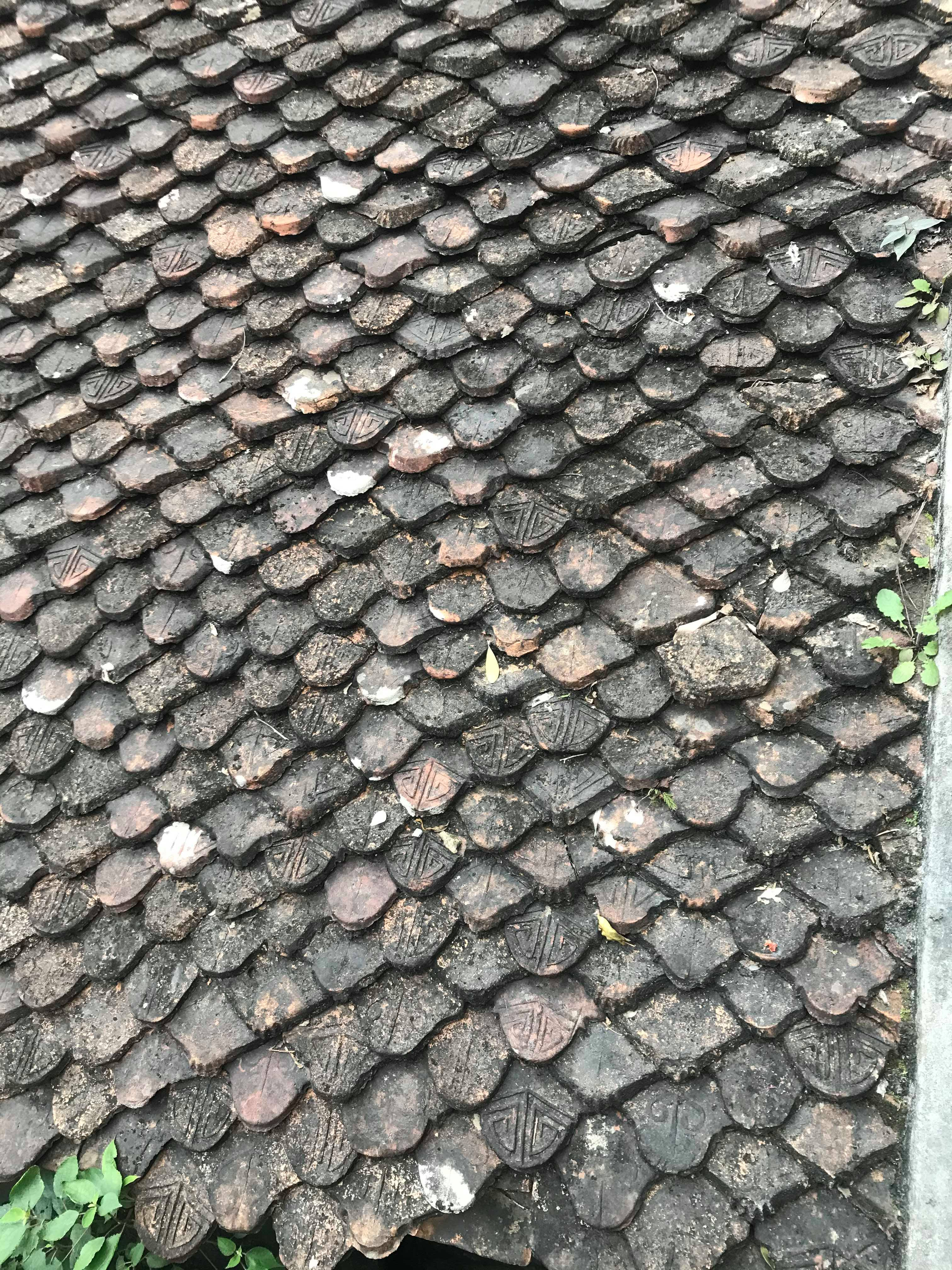 Hoa văn ngói chùa Hạ nhìn thấy được từ vị trí ba ngôi mộ phía sau.